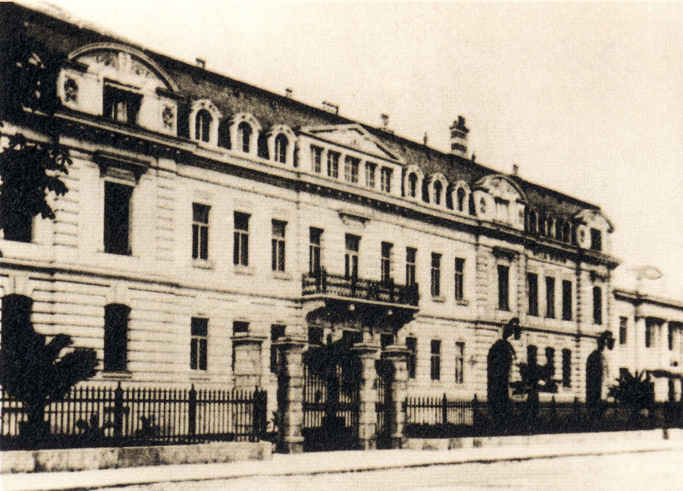 Mercedeshof (samt Garagenzubau), Baden bei Wien, Wienerstraße 45 (Bild: o.J.)